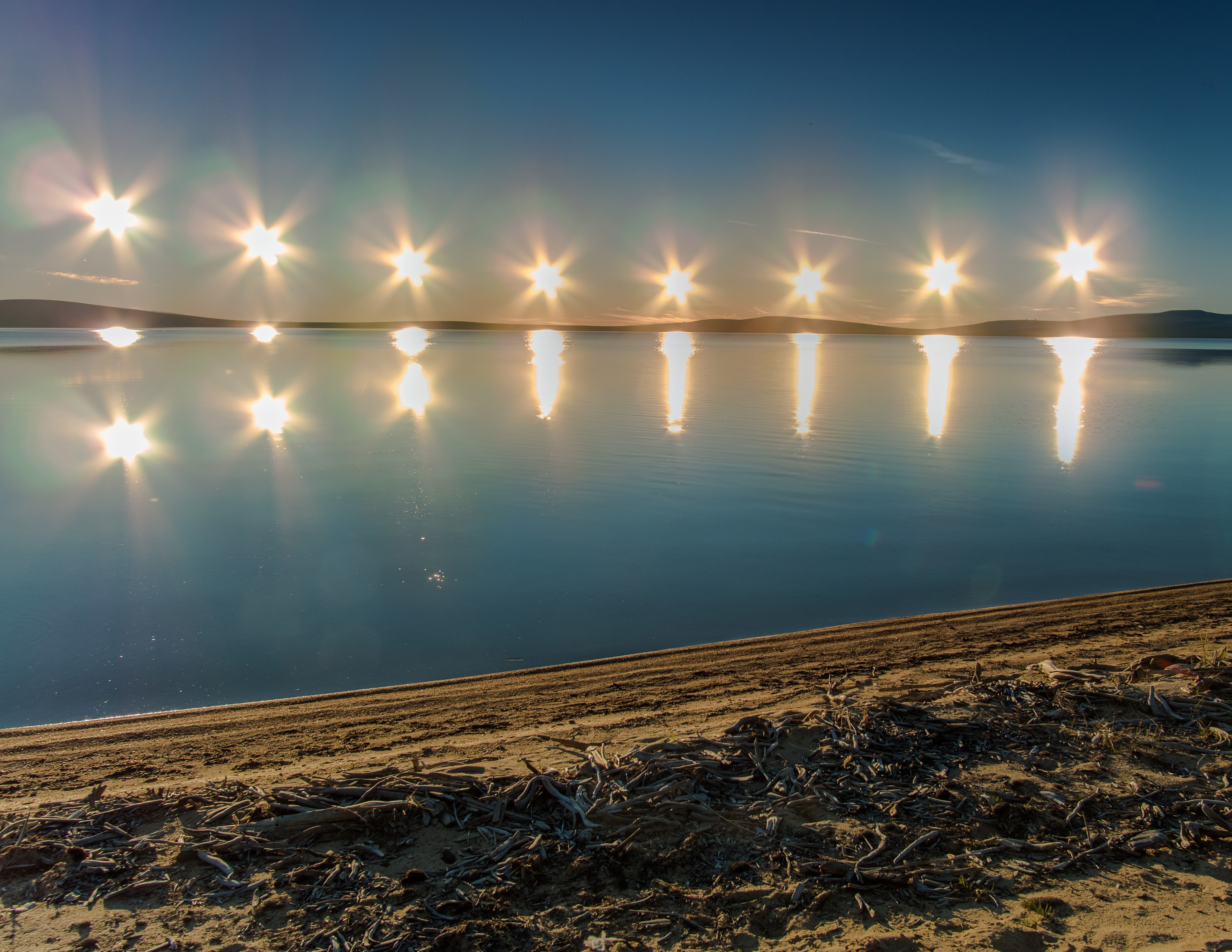 Озеро Ожогино: Расположен в административных границах Абыйского и Аллаиховского улусов, находится на левобережье реки Индигирка, Абыйский район, Якутия (Саха) This image is related to the protected area of Russia number 1410011